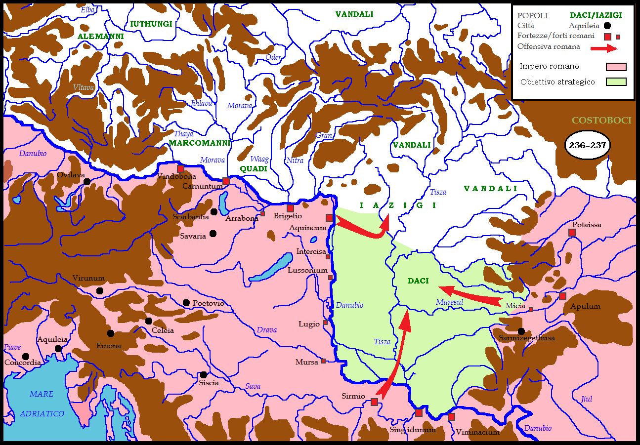 La Sarmazia al tempo di Massimino il Trace